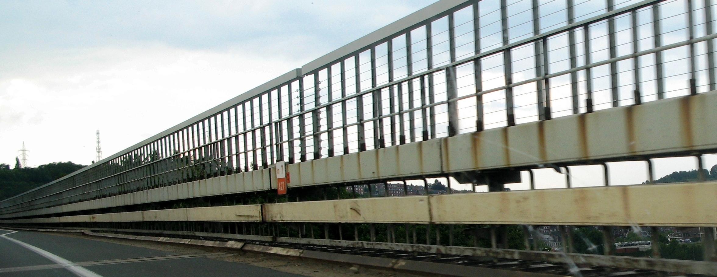 Leitplanken op dem Pont de Lambermont zu Verviers.